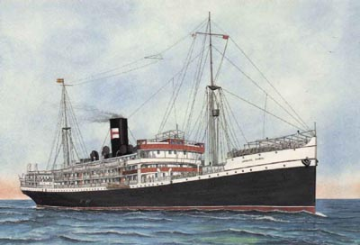 Vapor Infanta Isabel de la Naviera Pinillos, España, en una postal de 1913